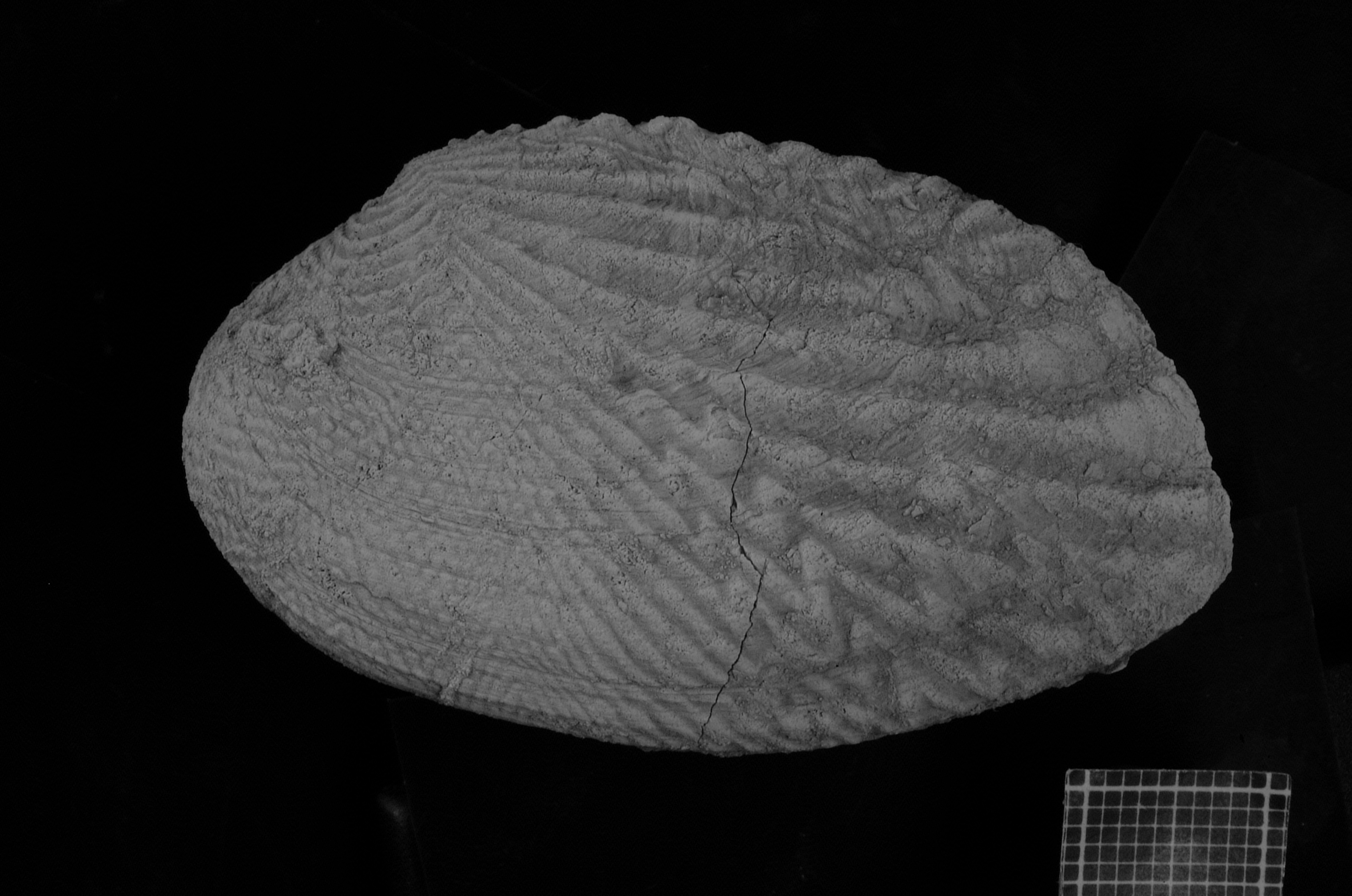 Vista izquierda de un ejemplar articulado del bivalvo marino fósil Ptuchomya koeneni. Formación Agrio, Cuenca Neuquina, Argentina